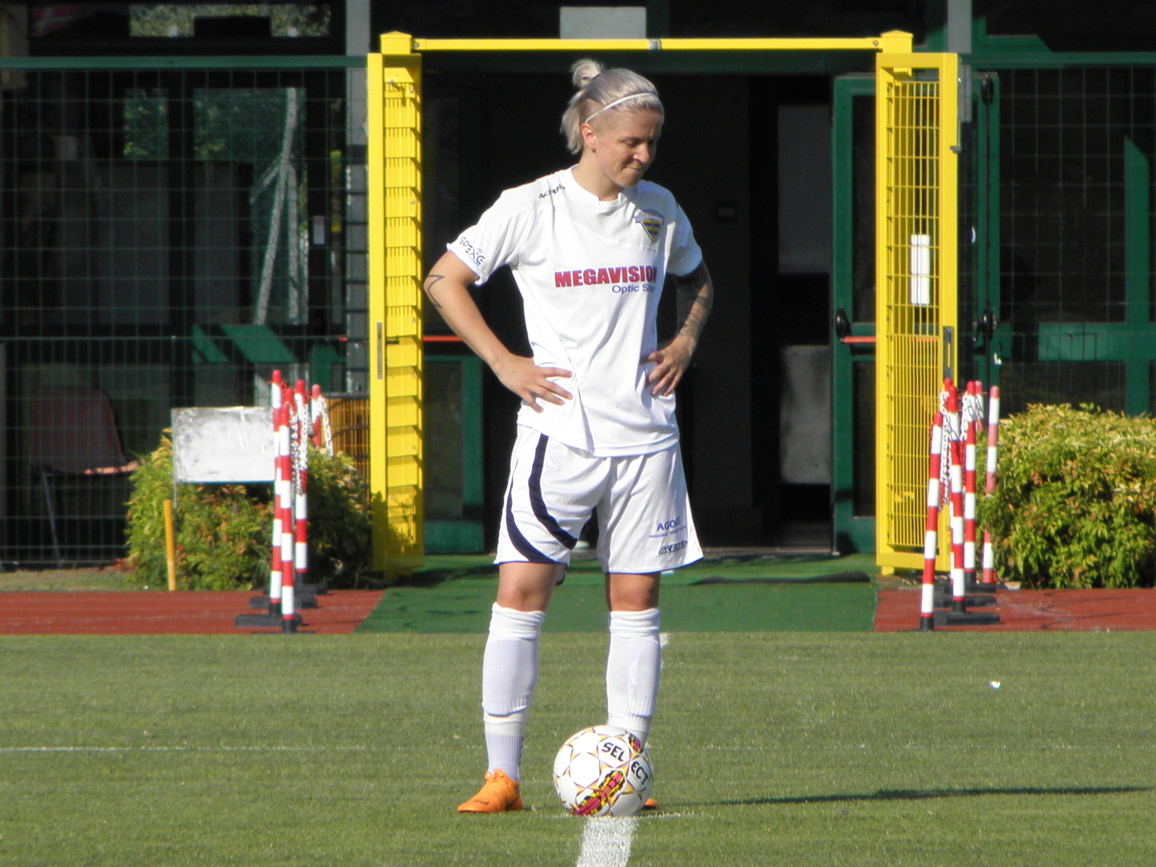 Abano Terme, Stadio delle Terme: 16 giugno 2018, spareggio UEFA Women's Champions League. Lana Clelland alla sua ultima partita con il Tavagnacco prima del calcio di inizio.